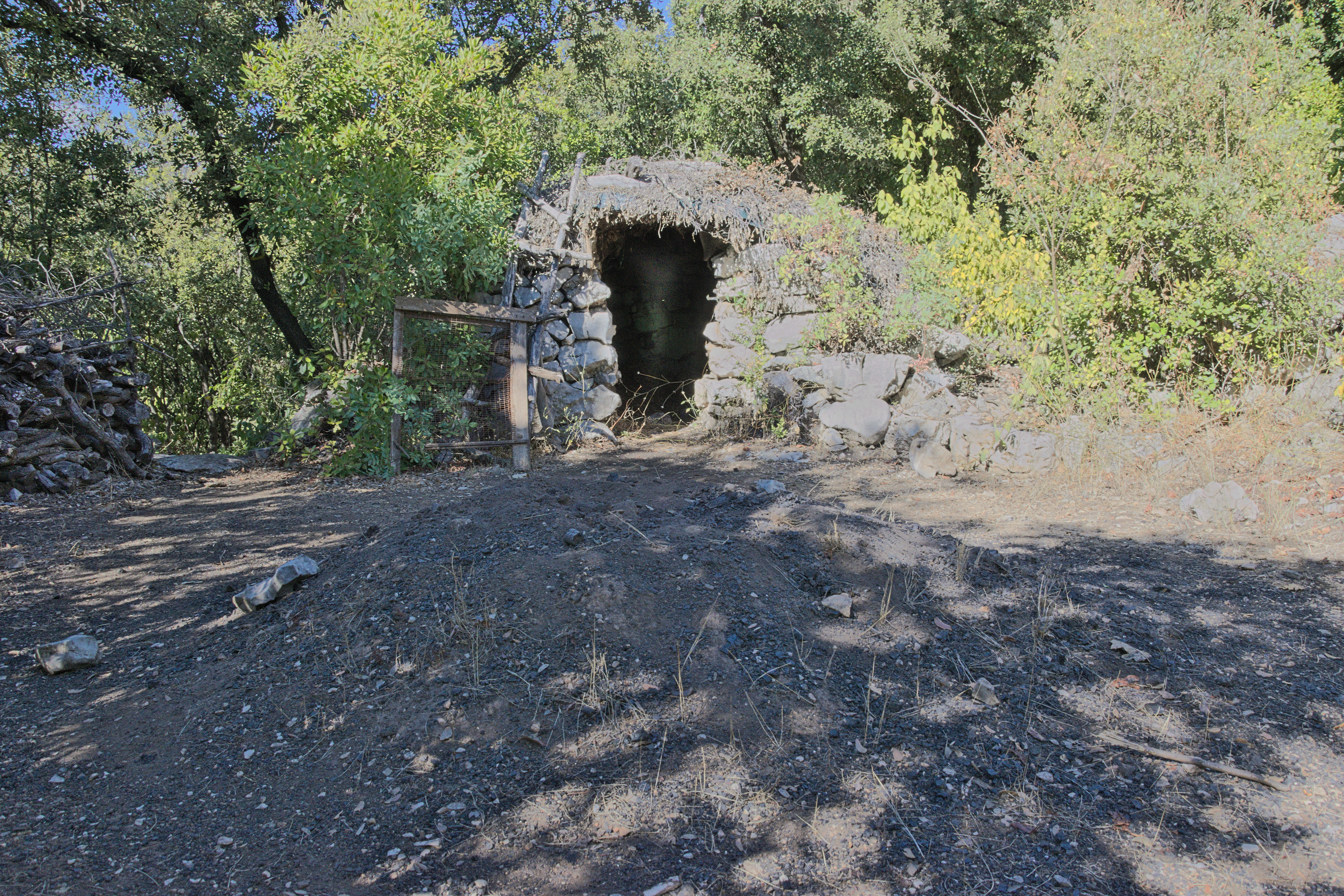 Une charbonnière ( restaurée ) à Sainte-Croix-de-Quintillargues dans l'Hérault.